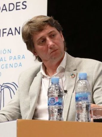 “En todo lo que hagamos hay que contar con los niños y los adolescentes”, ha asegurado la alcaldesa de Madrid, Manuela Carmena, en el transcurso del coloquio La Ciudad en un mundo de cambio: la infancia en el centro de las políticas locales, dentro del IV Congreso Internacional de Ciudades Amigas de la Infancia, organizado por Unicef en Caixaforum.